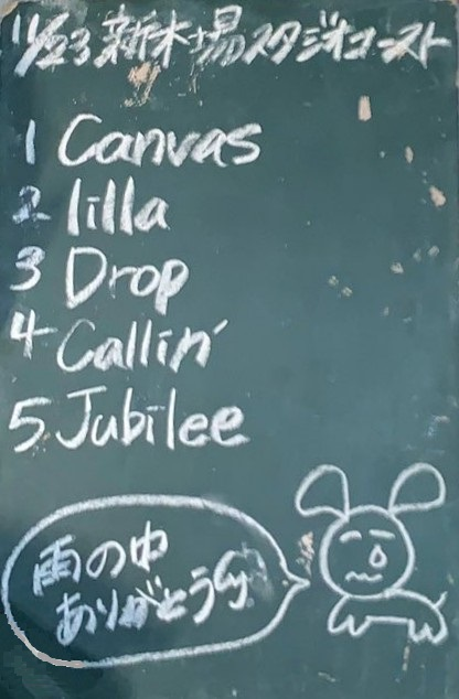 amiinAセトリボード